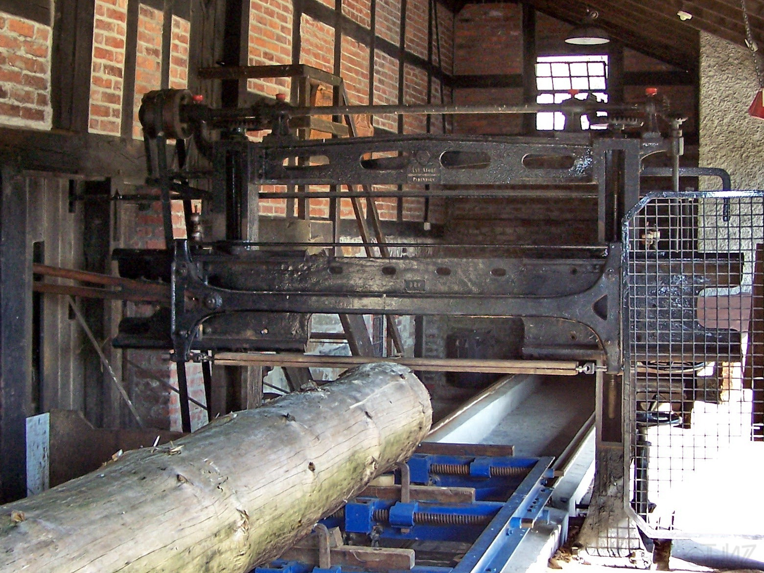 Detailaufnahme der Säge in File:Stuetings Muehle.JPG